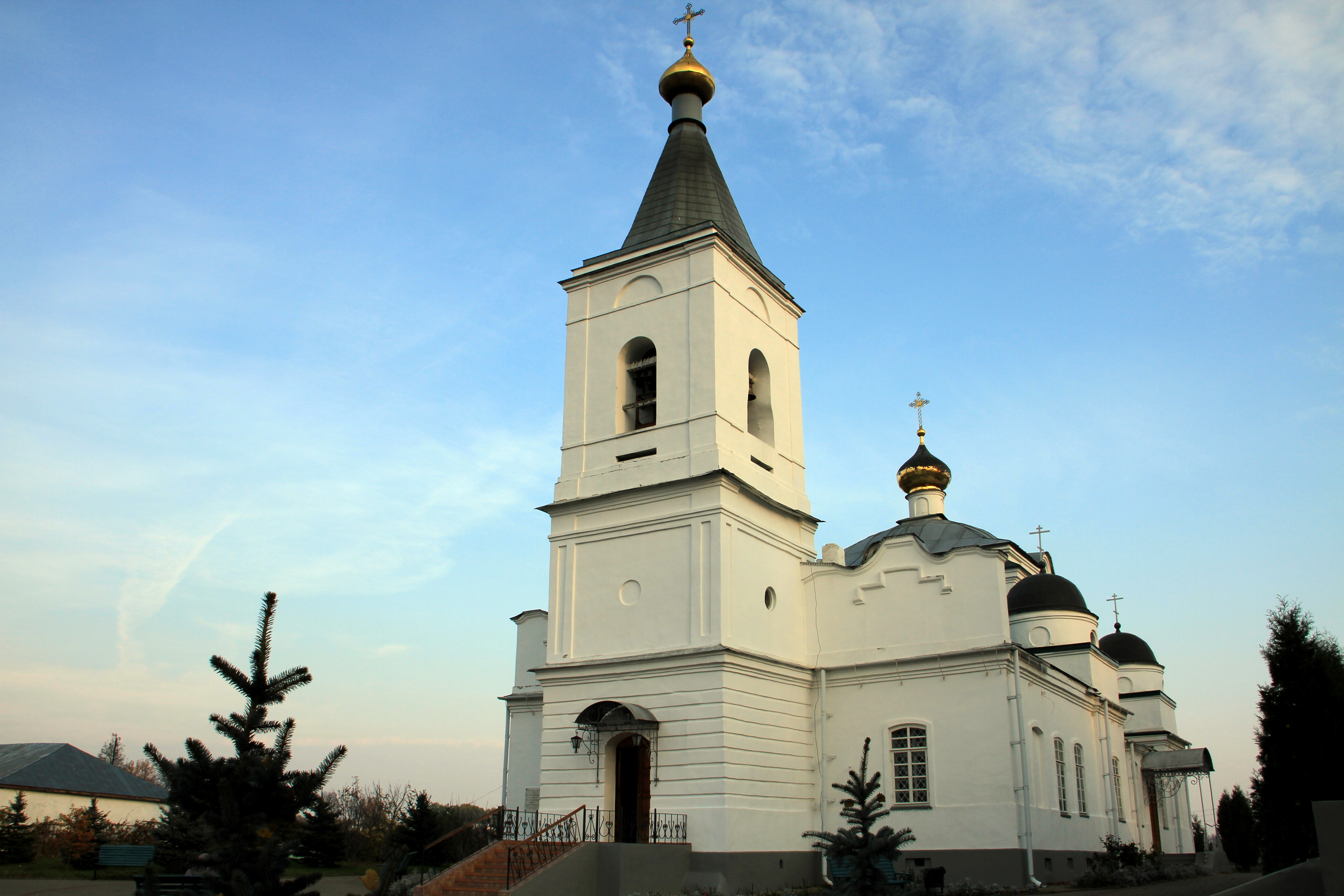 Спасо-преображенский собор (Смоленская область, Рославль, Пролетарская улица, 50)